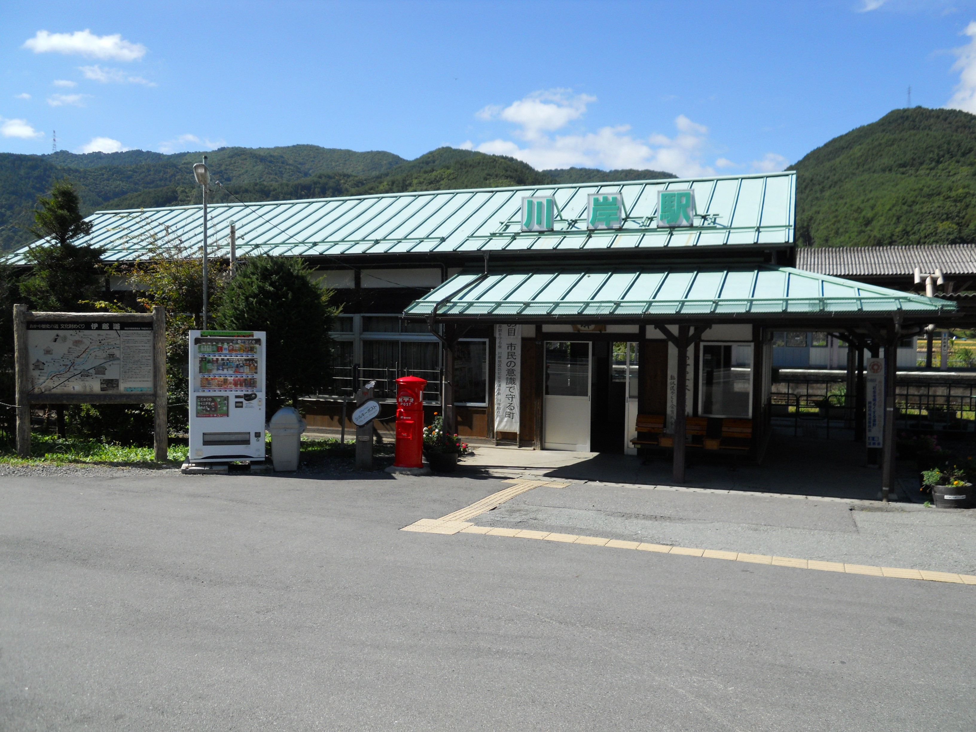 JR中央線川岸駅